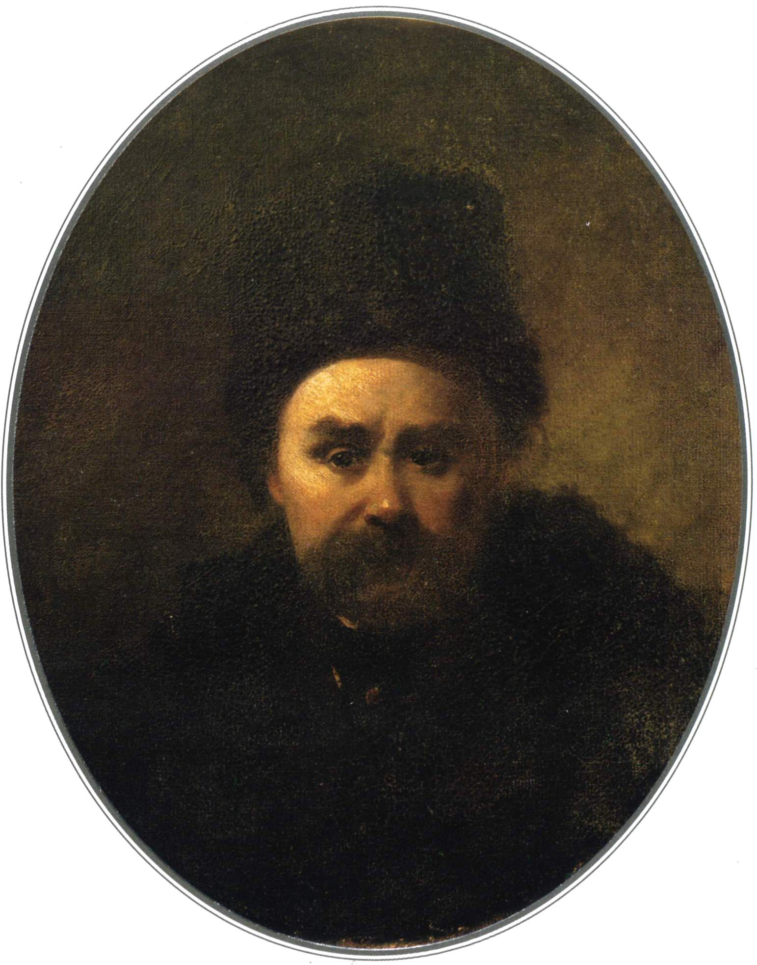 Т. Г. Шевченко. Автопортрет. 1861. Полотно, олія. 59 × 49 см. Національний музей Т. Г. Шевченка, Київ, Україна.